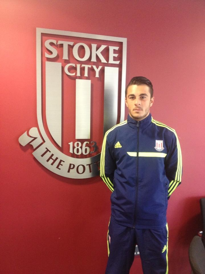 Kevin Gomez Nieto